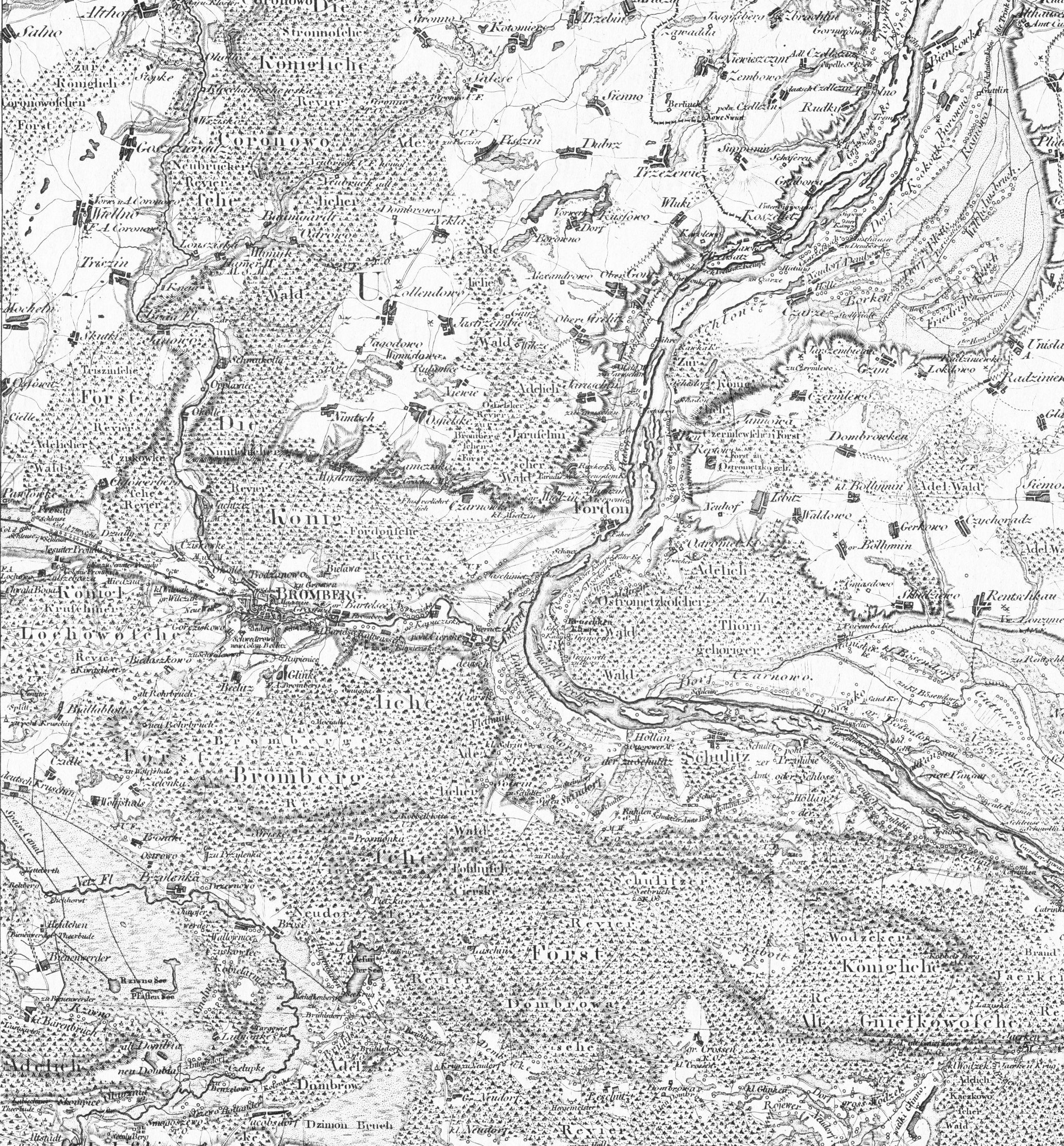 Fragment Karte von ost- Preussen nebst Preussisch - Litthauen und West- Preussen nebst dem Netzdistrict aufgenommen unter Leitung des Konigl. Preuss. Staats Ministers Frey Heern von Schroetter in den Jahren von 1796 bis 1802. Jack Scripsit et Sculpsit. Skala 1:50000